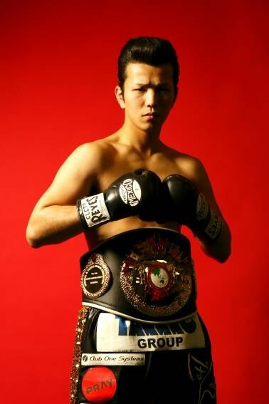 Shingo Wake